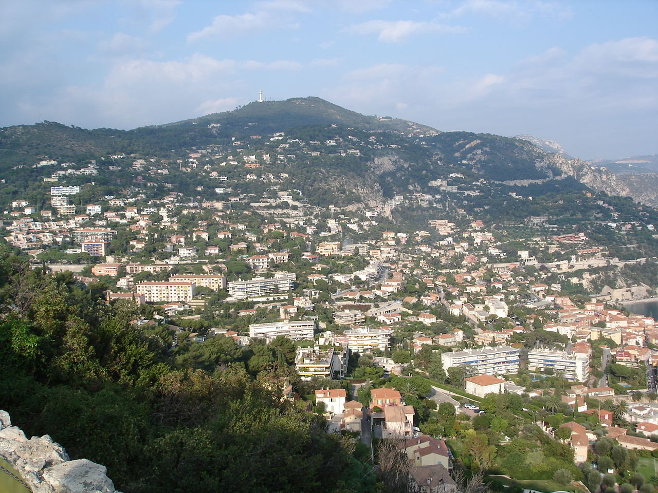 Vue générale de Villefranche-sur-mer avec au fond le Mont Leuze et le Plateau Saint-Michel